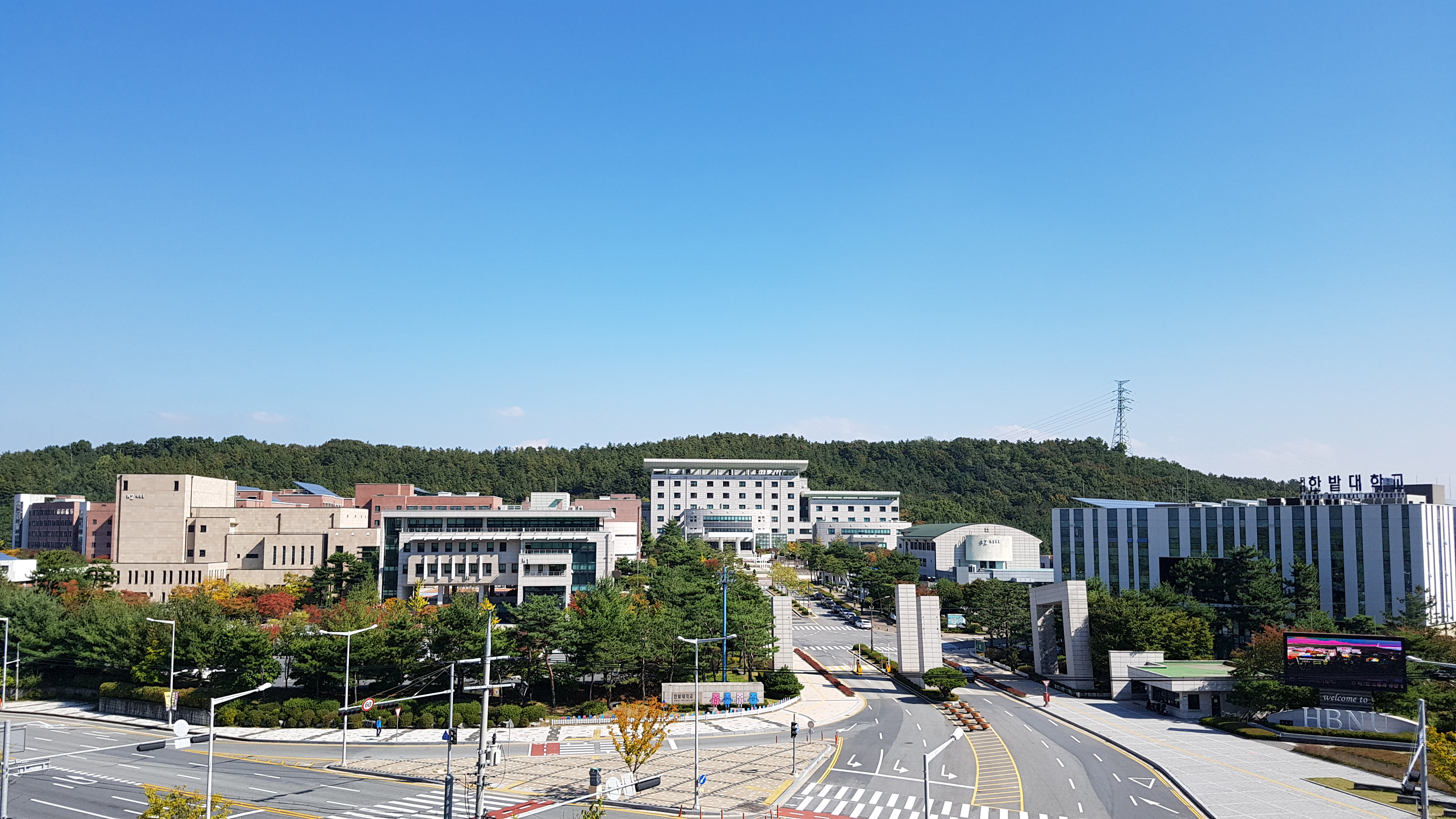 한밭대학교 유성캠퍼스입니다.